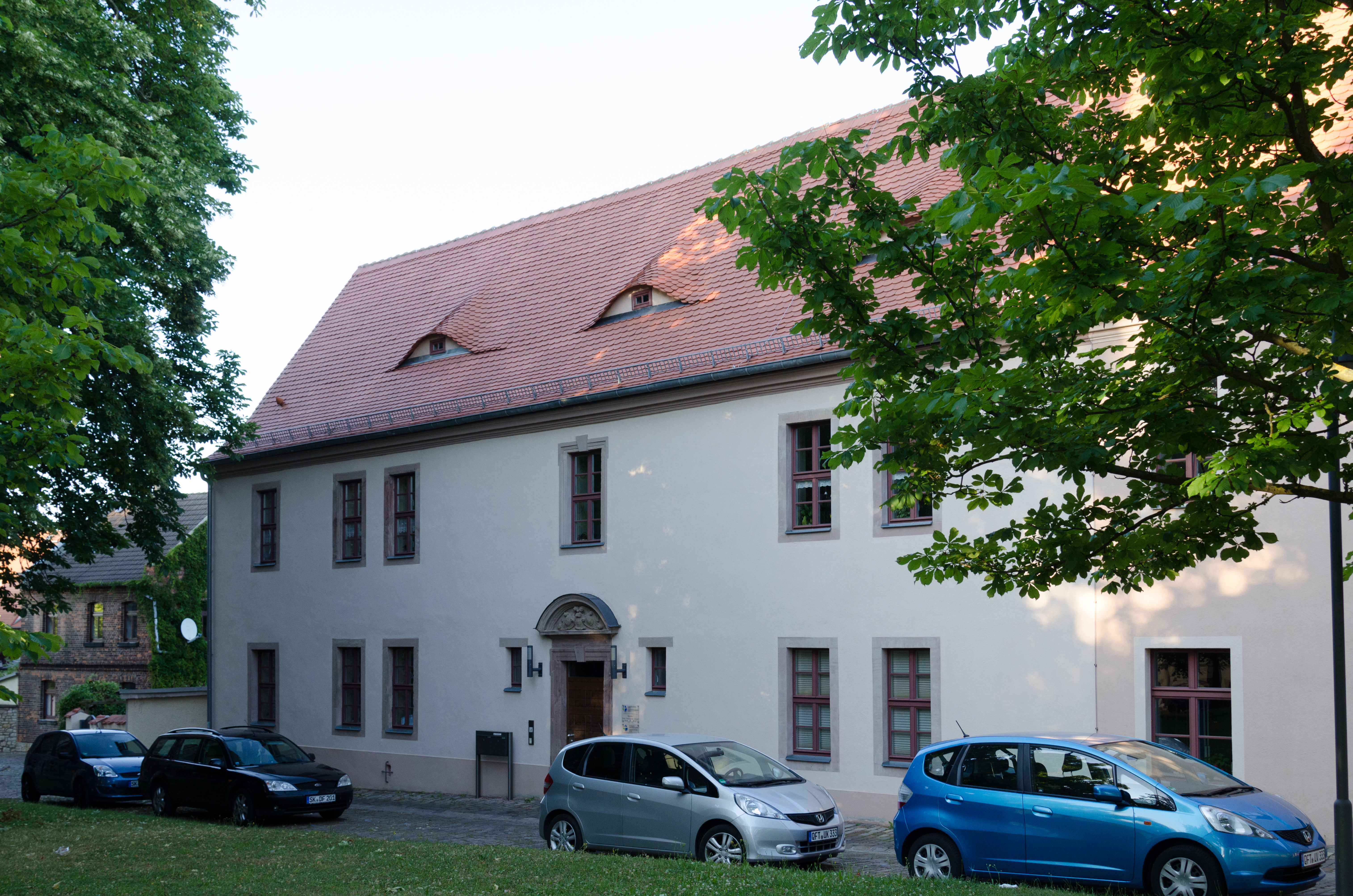 Querfurt, Kirchplan 2